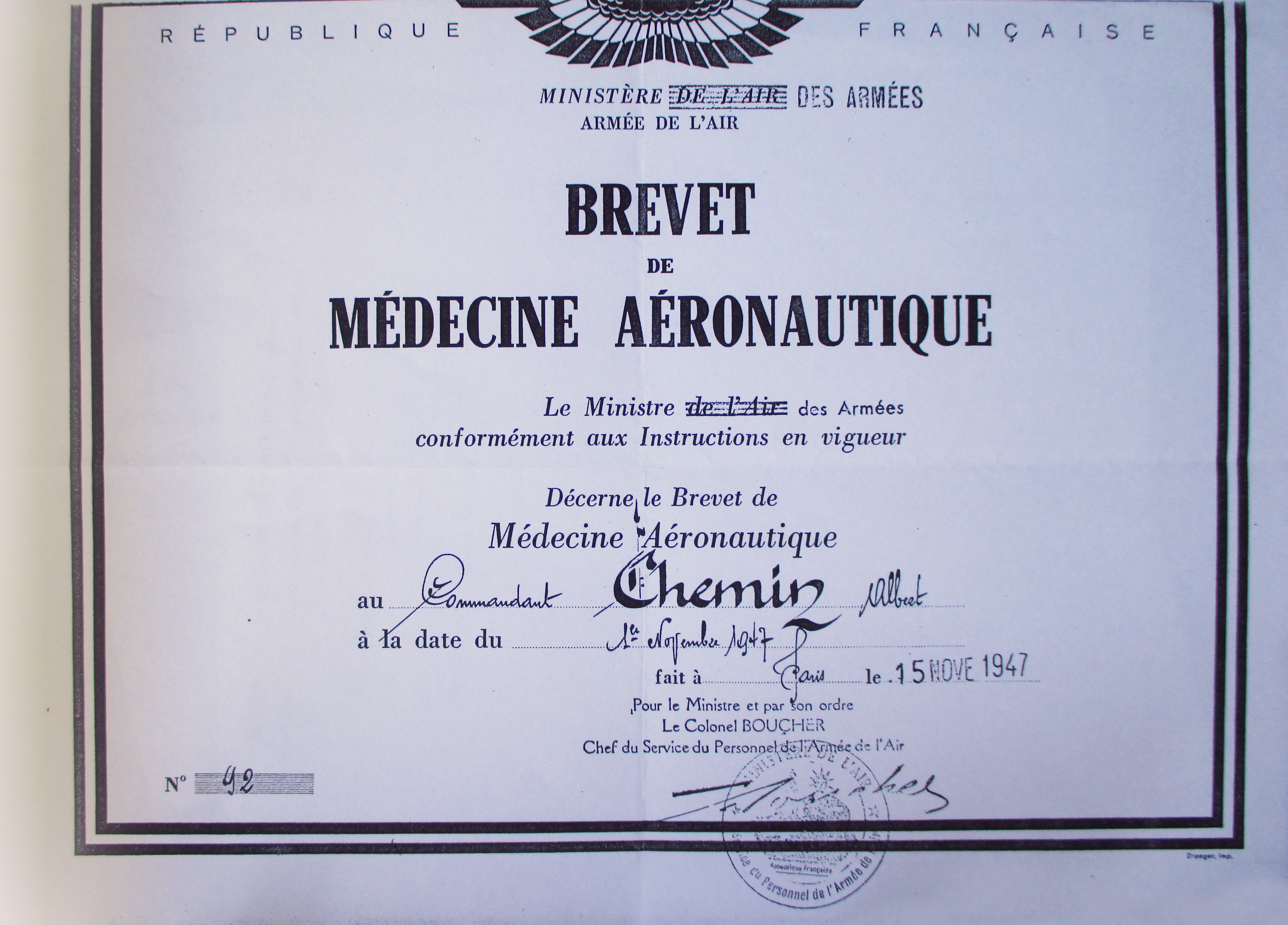 Copie noir et blanc du brevet de médecine aéronautique d'Albert Chemin, 15 novembre 1947.